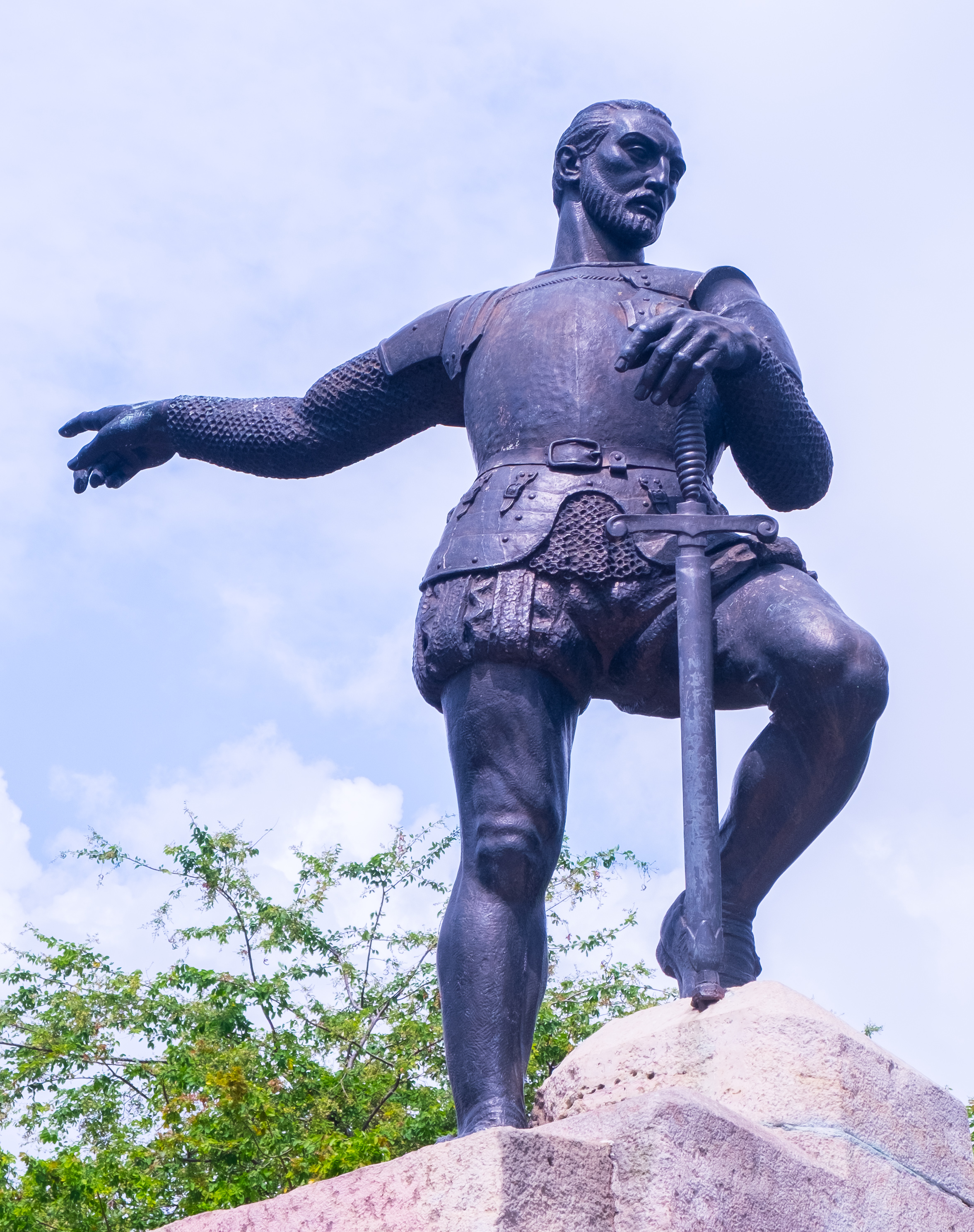 Estatua de Sebastián de Belalcázar.